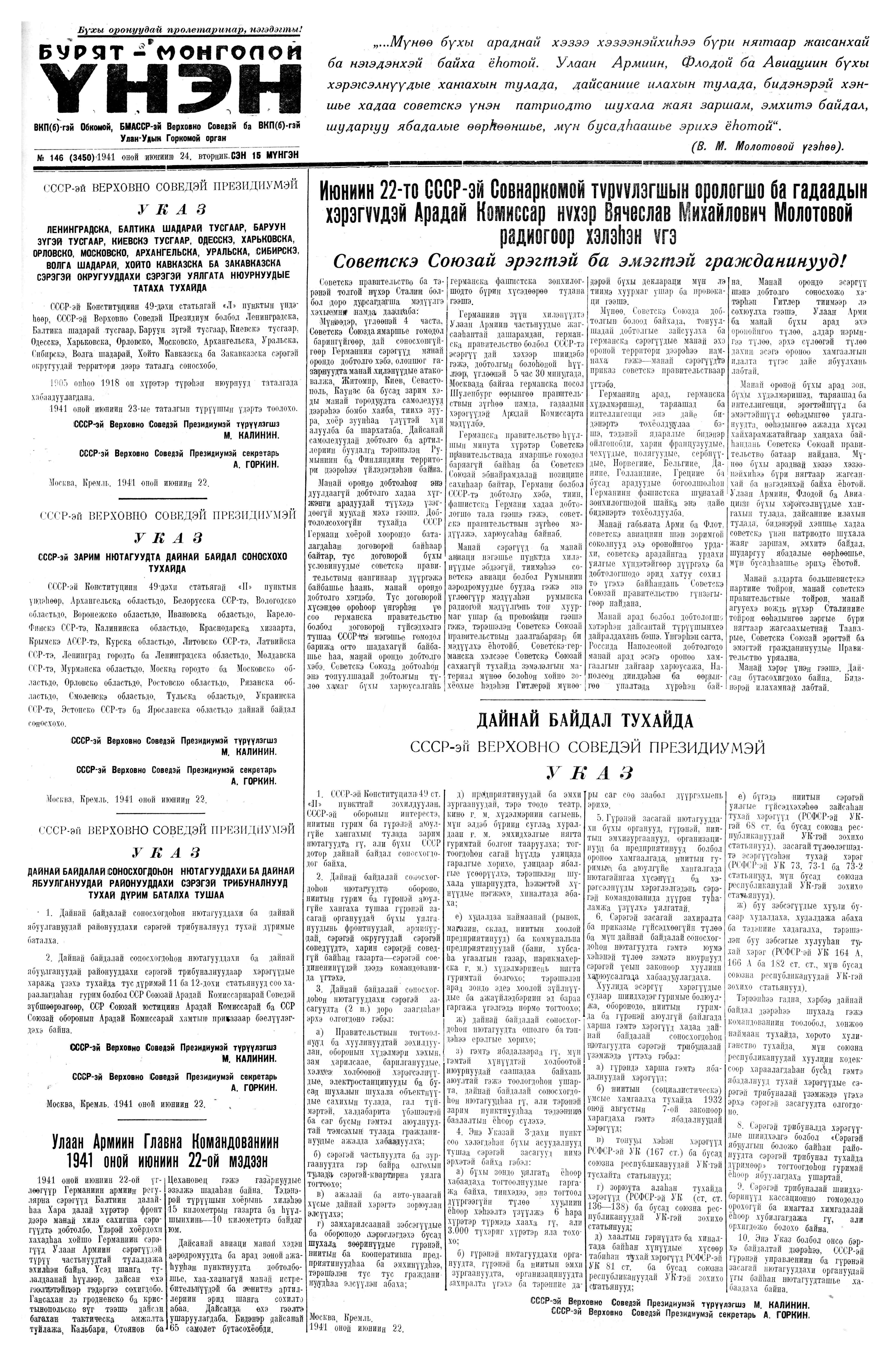 Выпуск Буряад-Монголой Үнэн за 1941-06-24